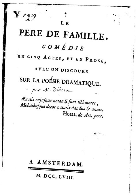 title page from 1758 edition of Le Père de famille